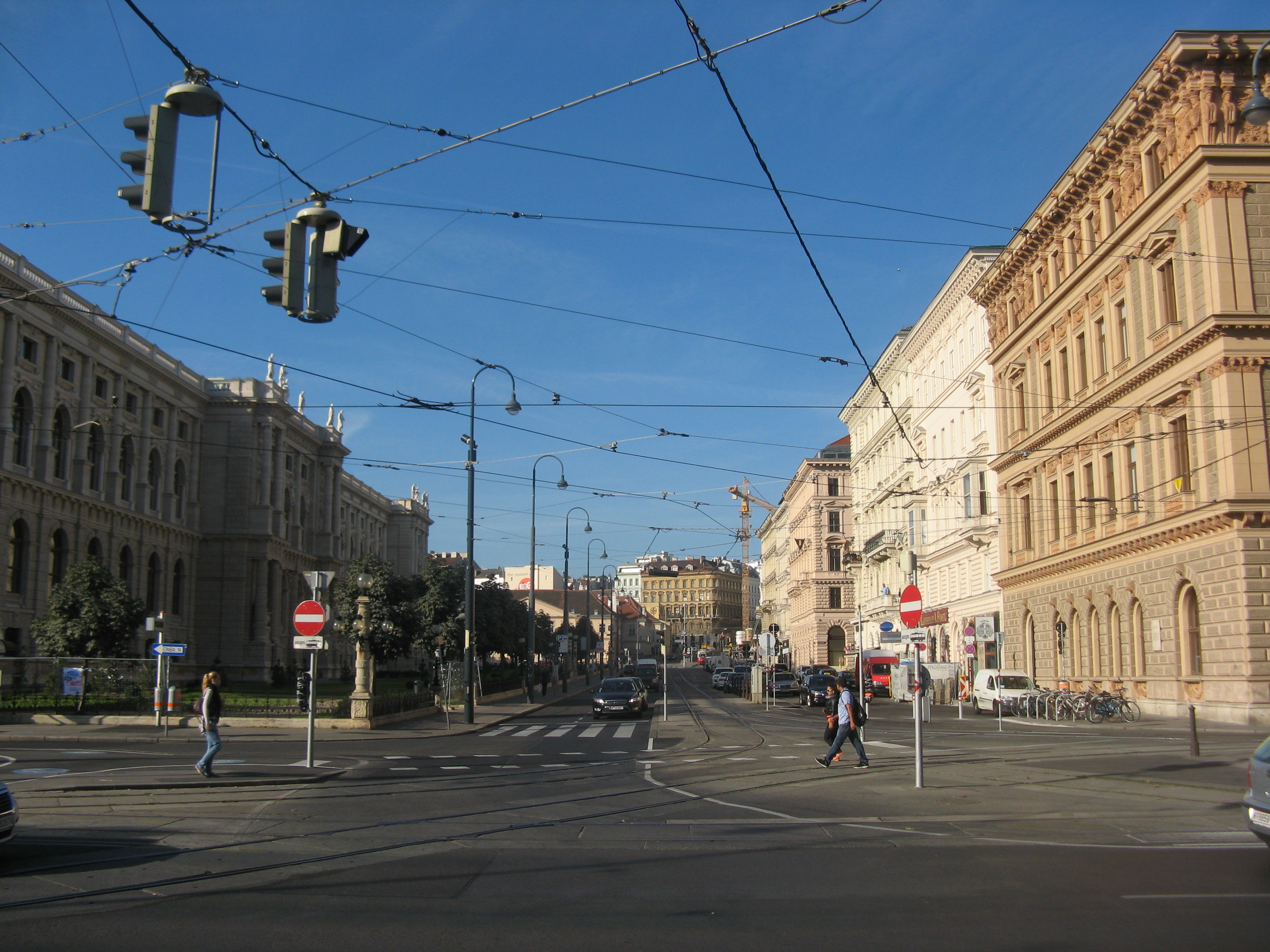 Bellariastraße gegen Westen, Wien-Innere Stadt